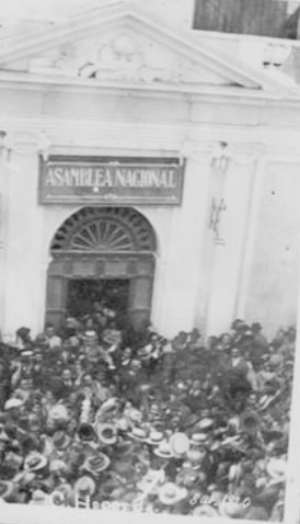 Carlos Herrera, saliendo de la Asamble Nacional tras ser designado presidente de Guatemala el 8 de abril de 1920.